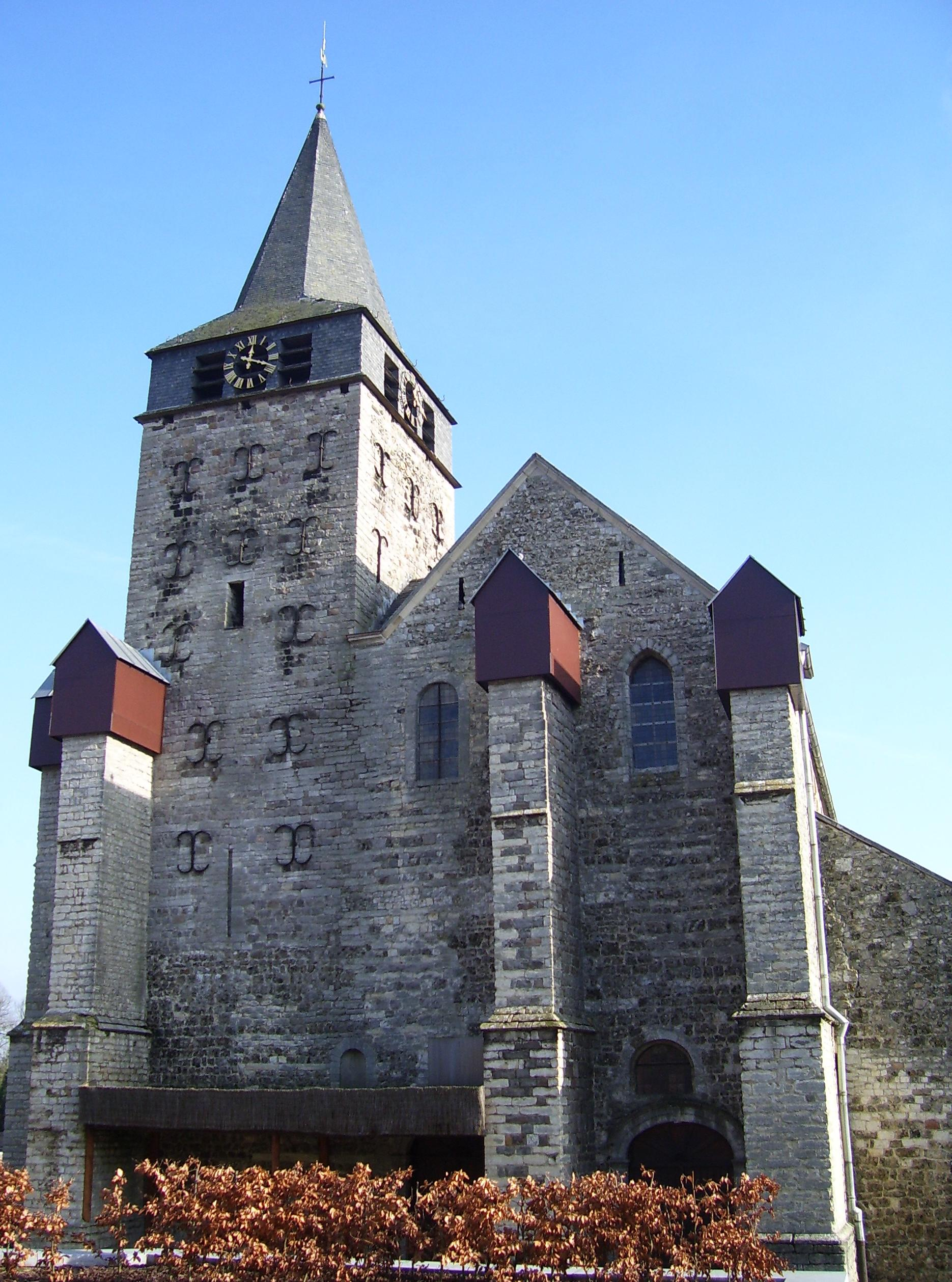 Eglise Saints-Martin et Adèle, Church in Orp-le-Grand (Orp-Jauche), Belgium